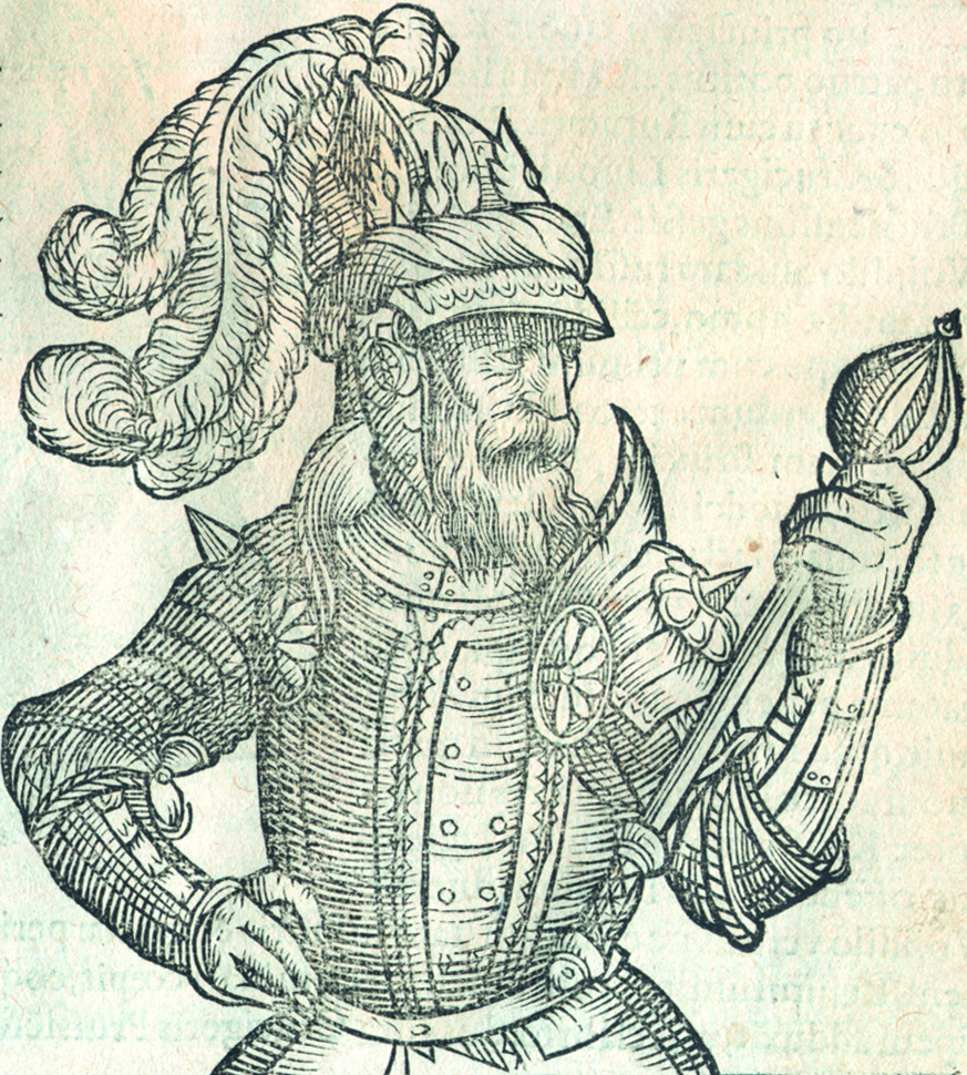 Беларуская (тарашкевіца): Уяўны партрэт вялікага князя Альгерда (Algierd)